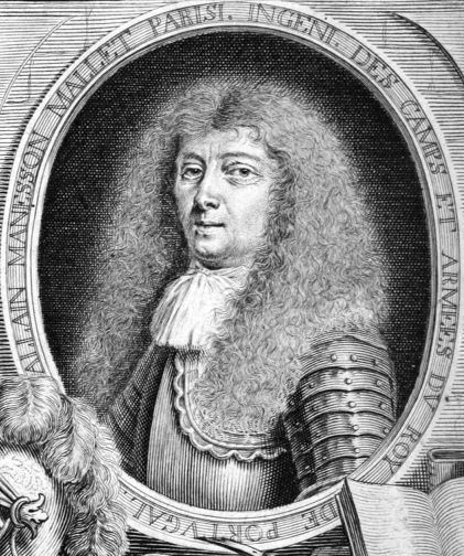 Portrait of Alain Manesson Mallet (1630–1706)